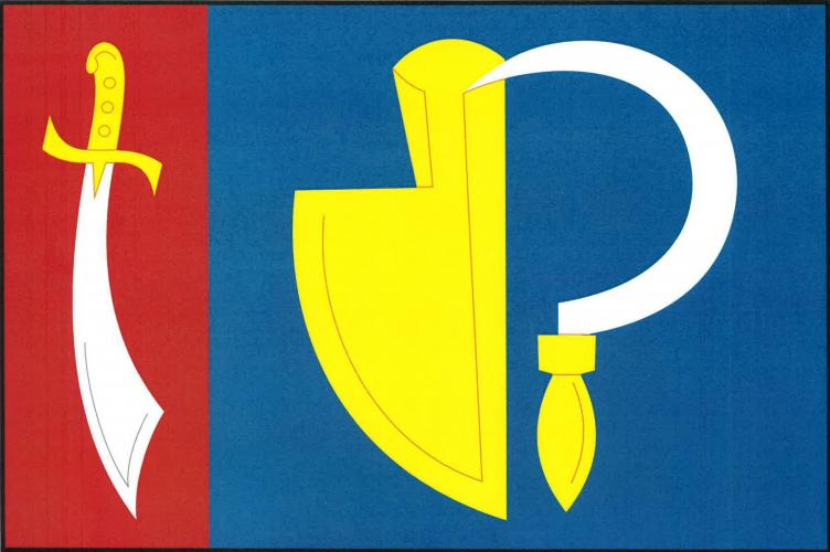 Lazníčky vlajka